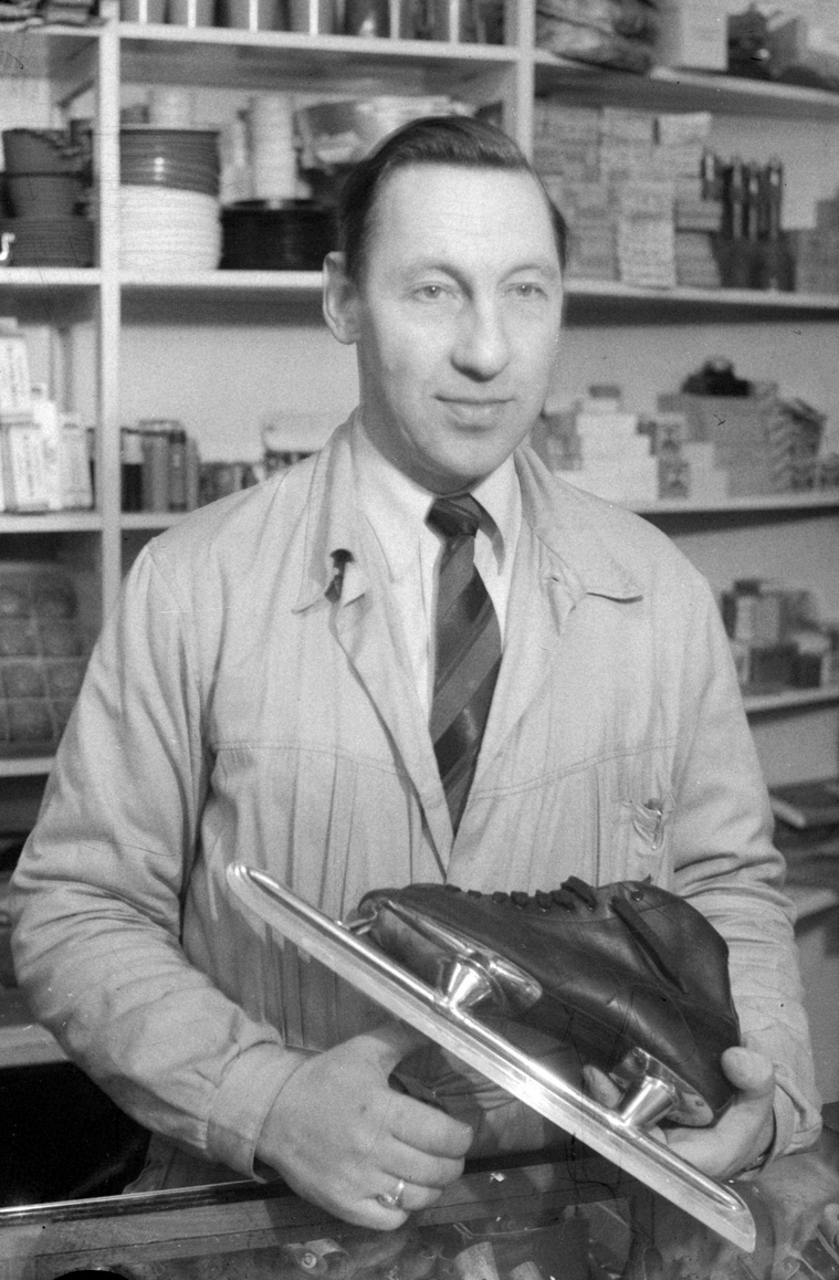 Ivar Ballangrud